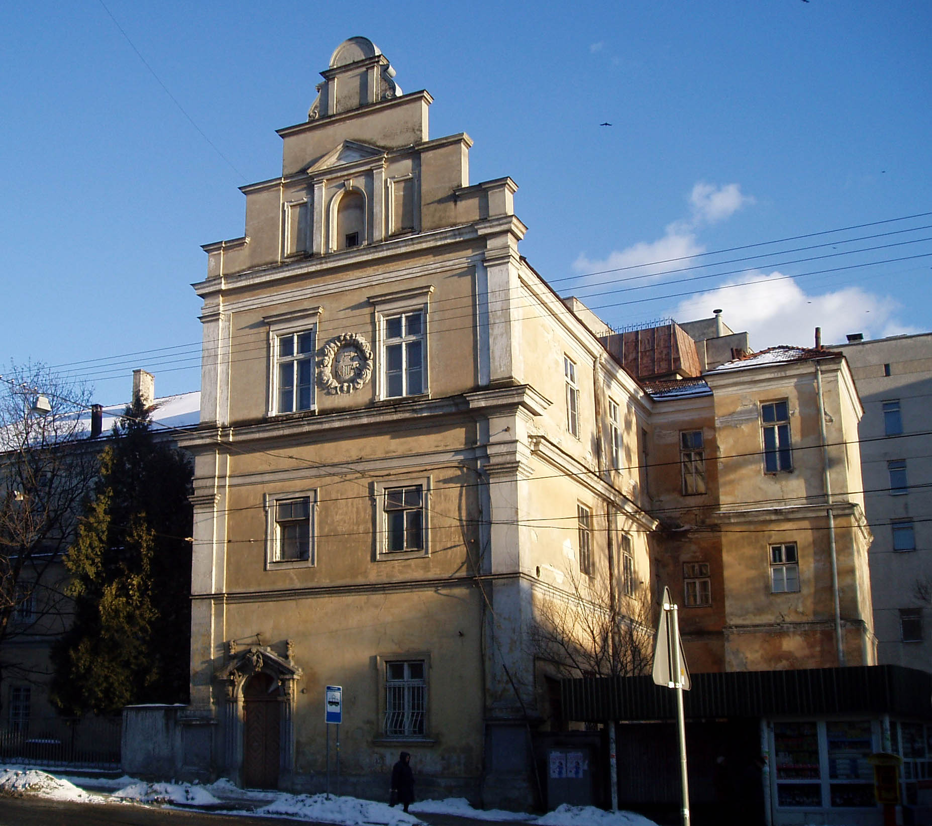 Шпиталь братів боніфратрів у Львові. На передньому плані колишній костел, перебудований у 1690-х роках на шпиталь.